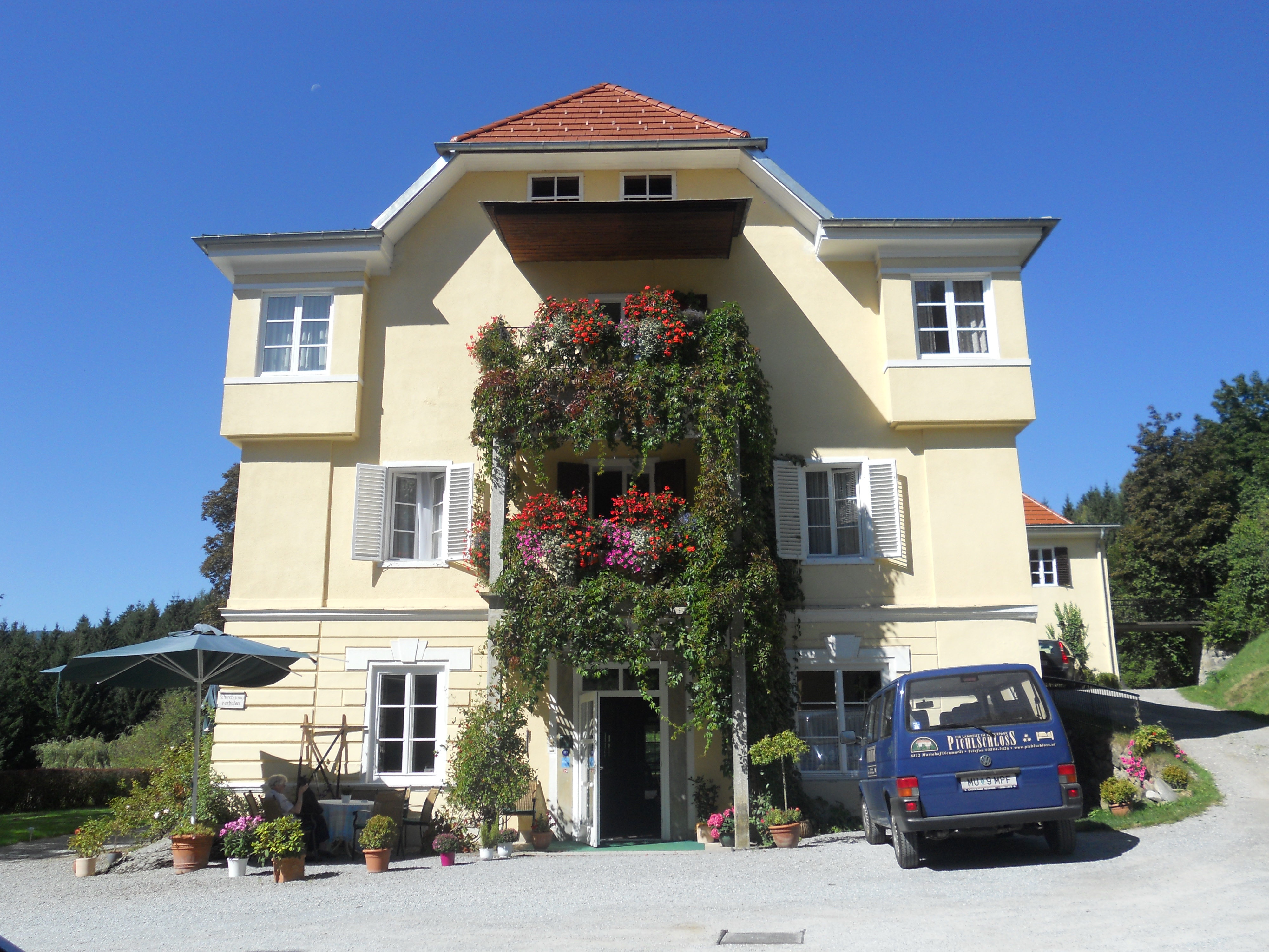 Pichlschloss, hinteres Nebengebäude